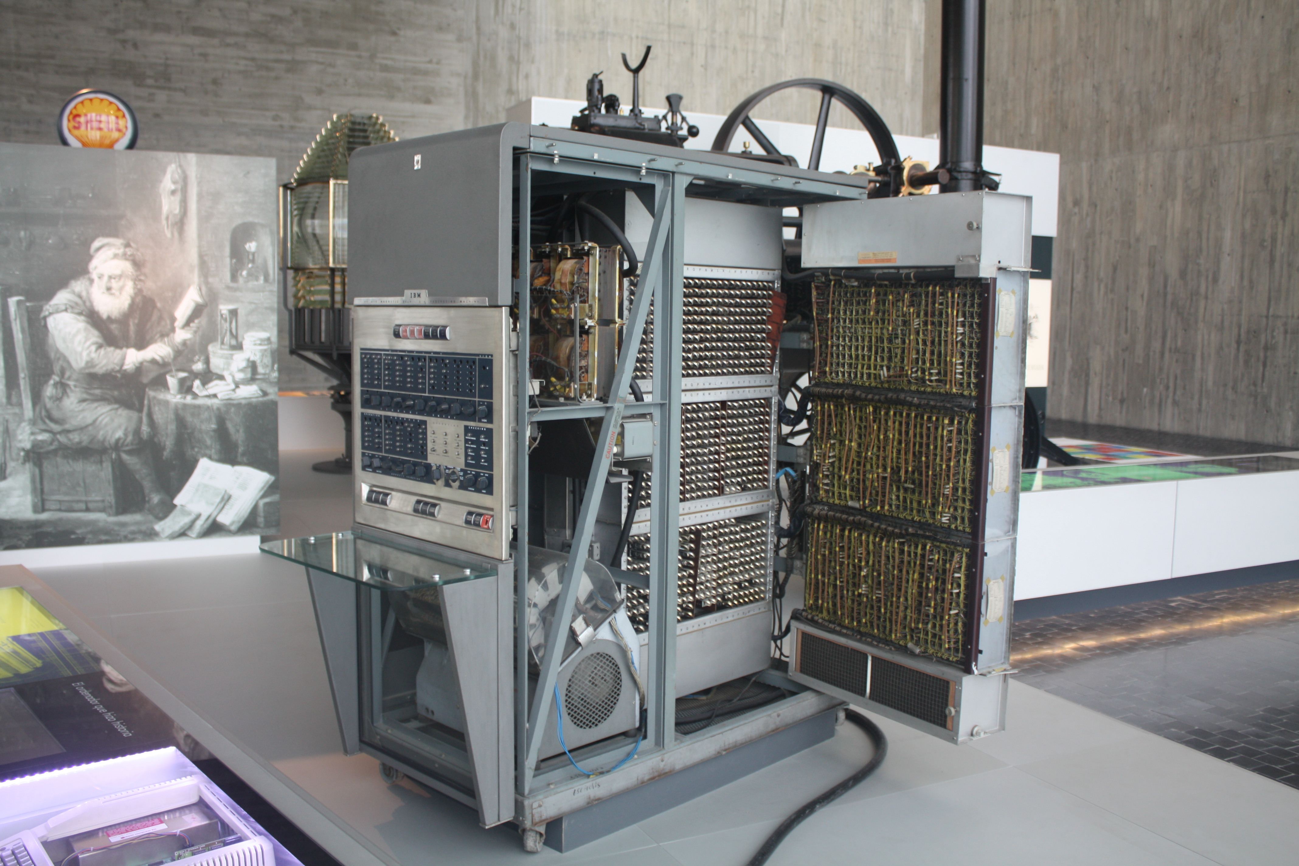 Ordenador IBM 650, modelo comercializado entre 1954 e 1962. O da fotografía, exposto no Museo Nacional de Ciencia y Tecnología da Coruña, instalouse no Centro de Cálculo da Renfe, en Madrid, en 1959. O prezo do modelo, ó valor actual, equivalería a 5,5 millóns de euros.